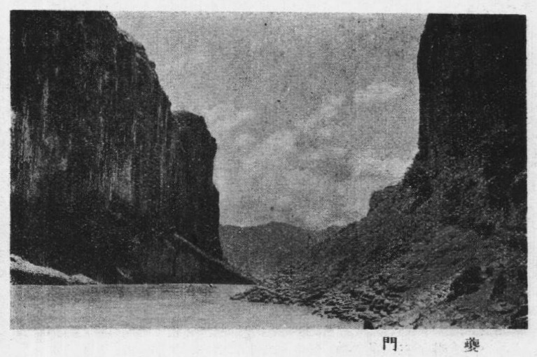 鄭璧成著四川導遊插圖